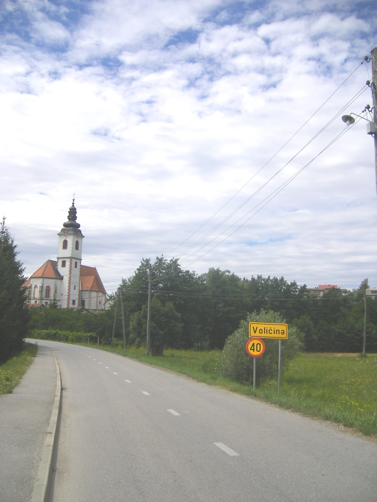 Spodnja Voličina (Municipality Lenart)